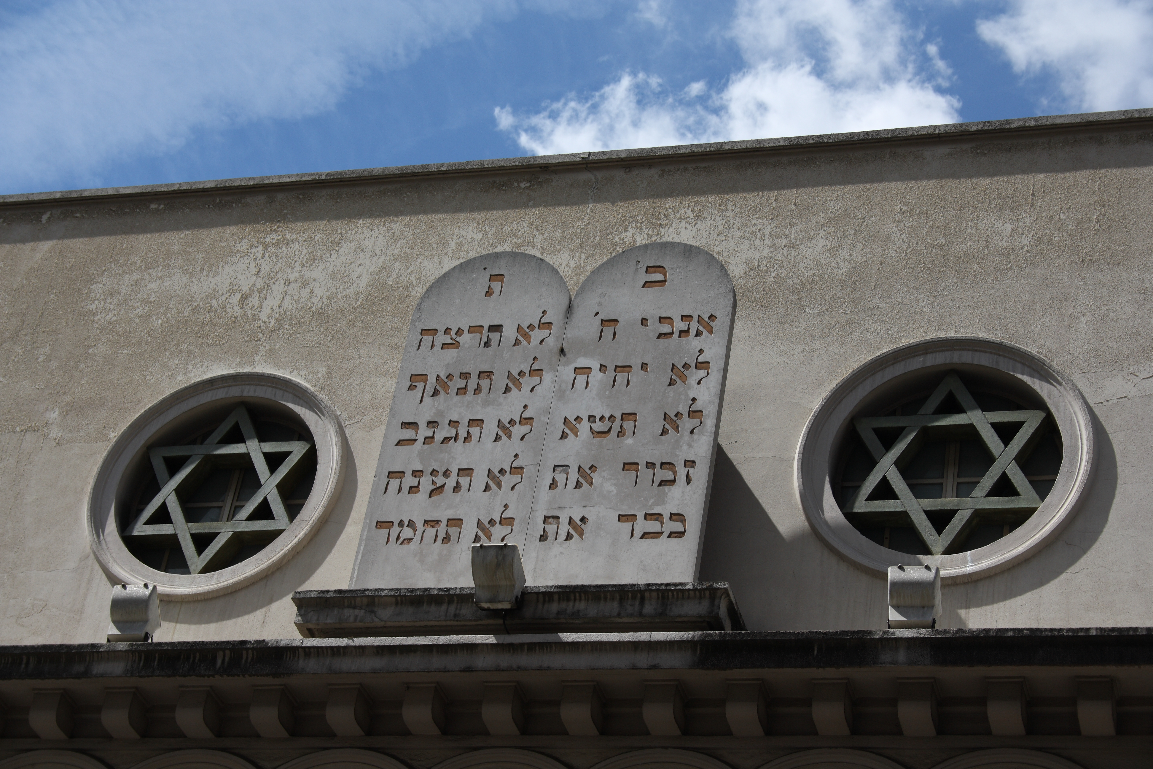 Synagoge von Neuilly, 12, rue Ancelle in Neuilly-sur-Seine, Gesetzestafel über dem Eingang in der Rue Ancelle